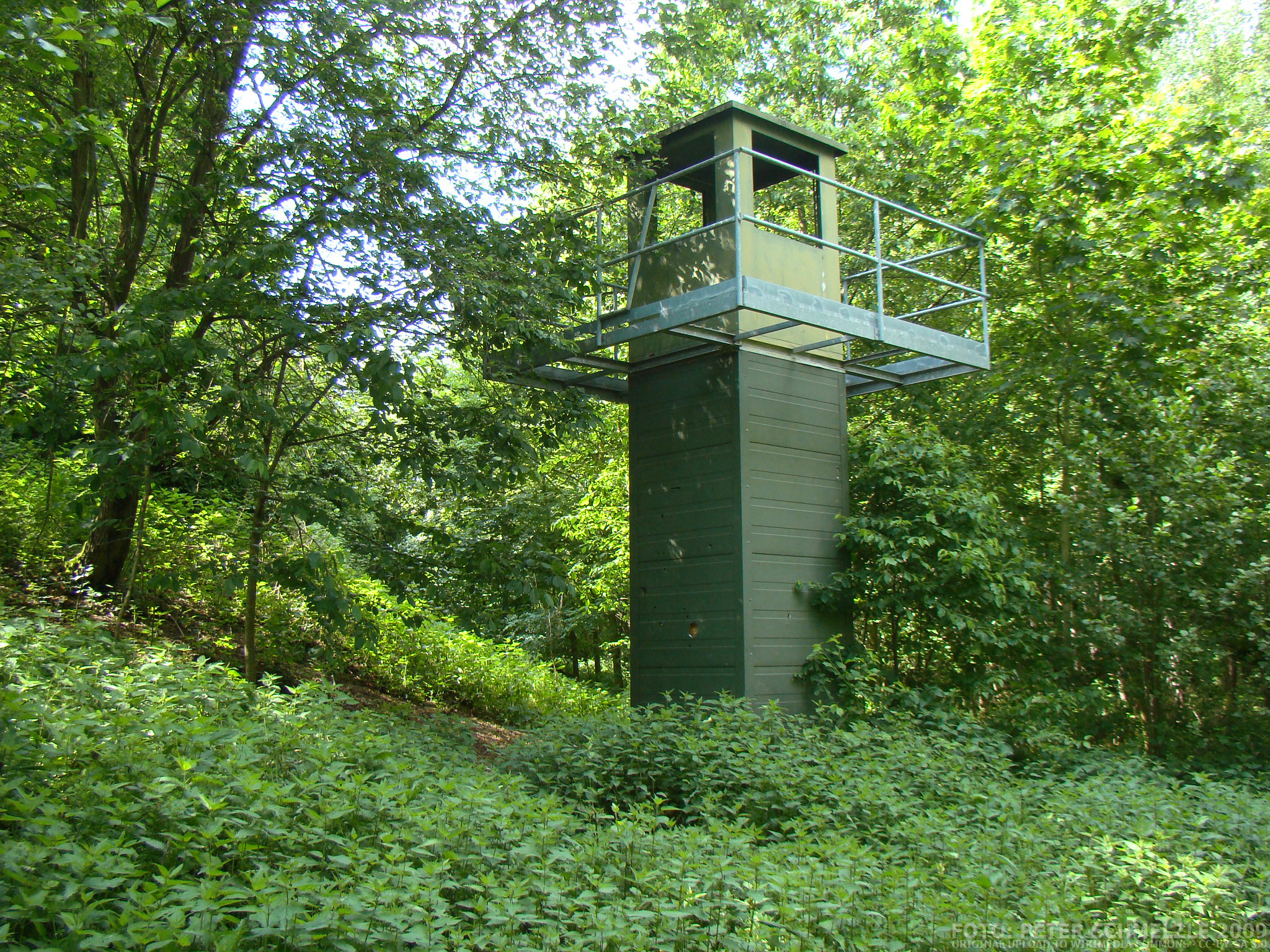 Wachturm des ehemaligen US-Stützpunkts "Waldheide" bei Heilbronn